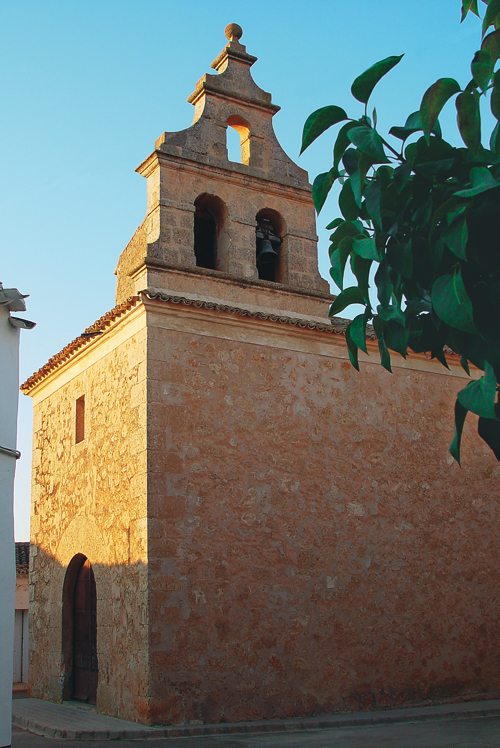 Iglesia Parroquial de Santa María Magdalena en Casas de Haro.